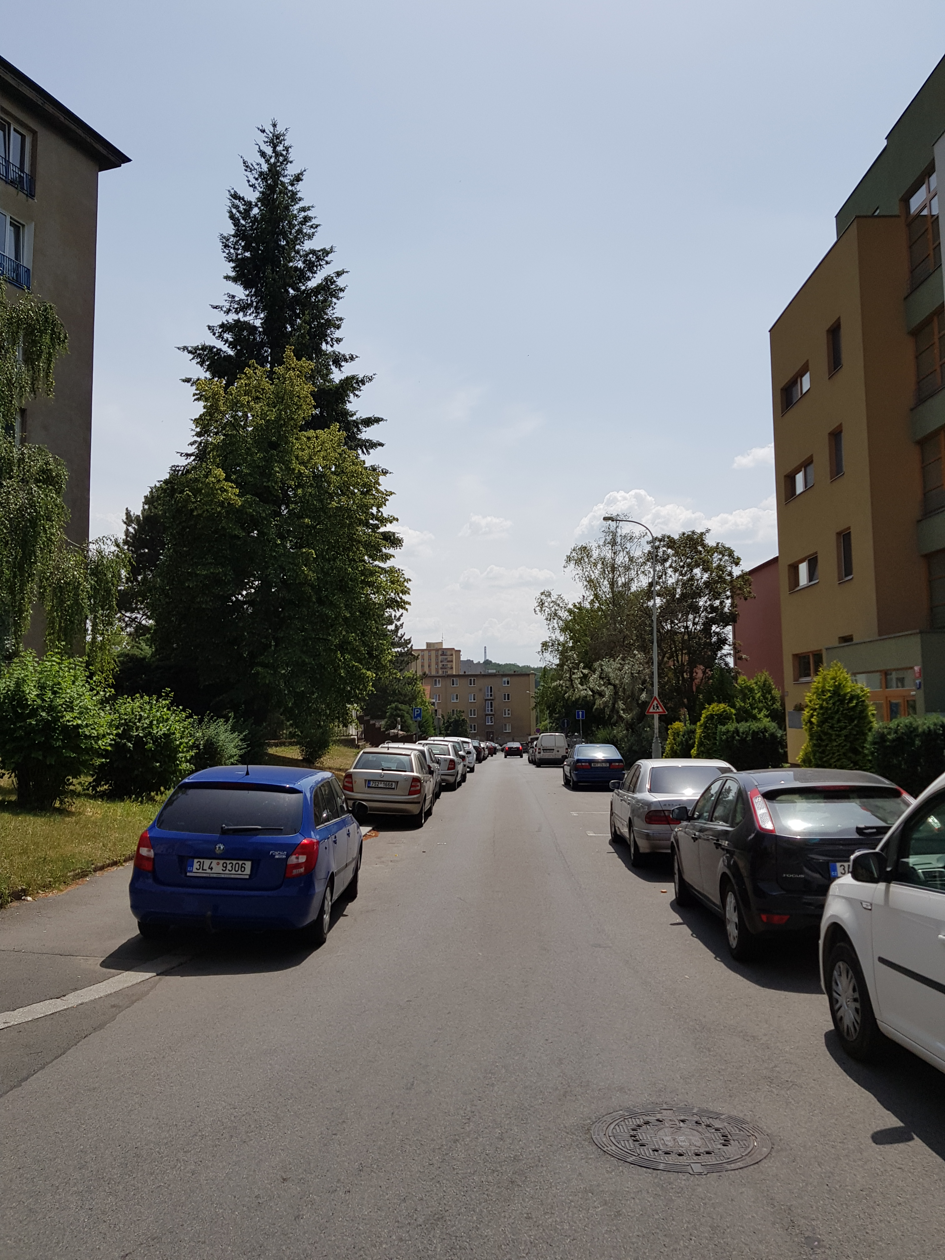 Ulice Nehvizdská, Praha 14-Hloubětín, pohled od severu